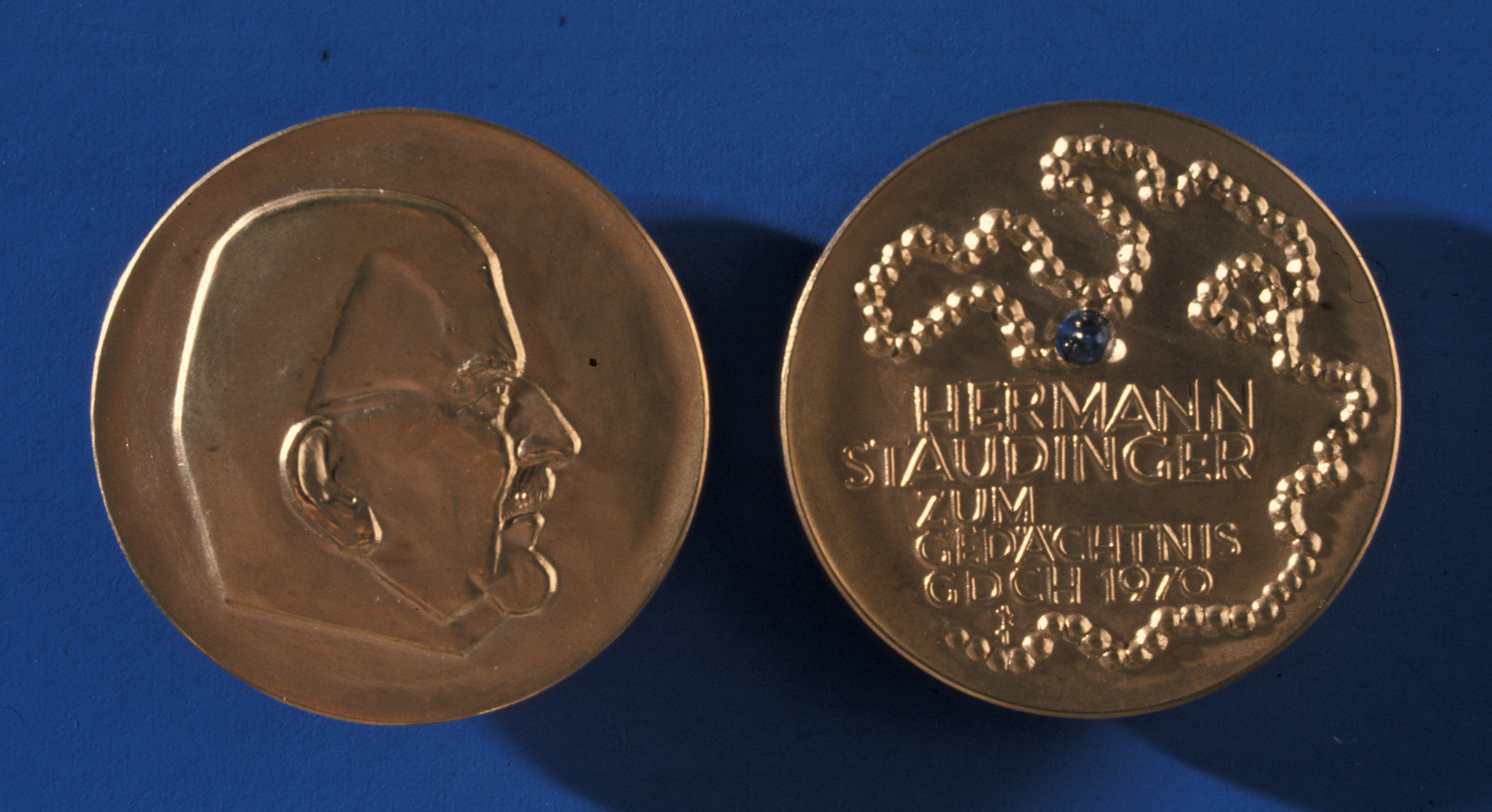 Abbildung der Medaille (Vor- und Rückseite)